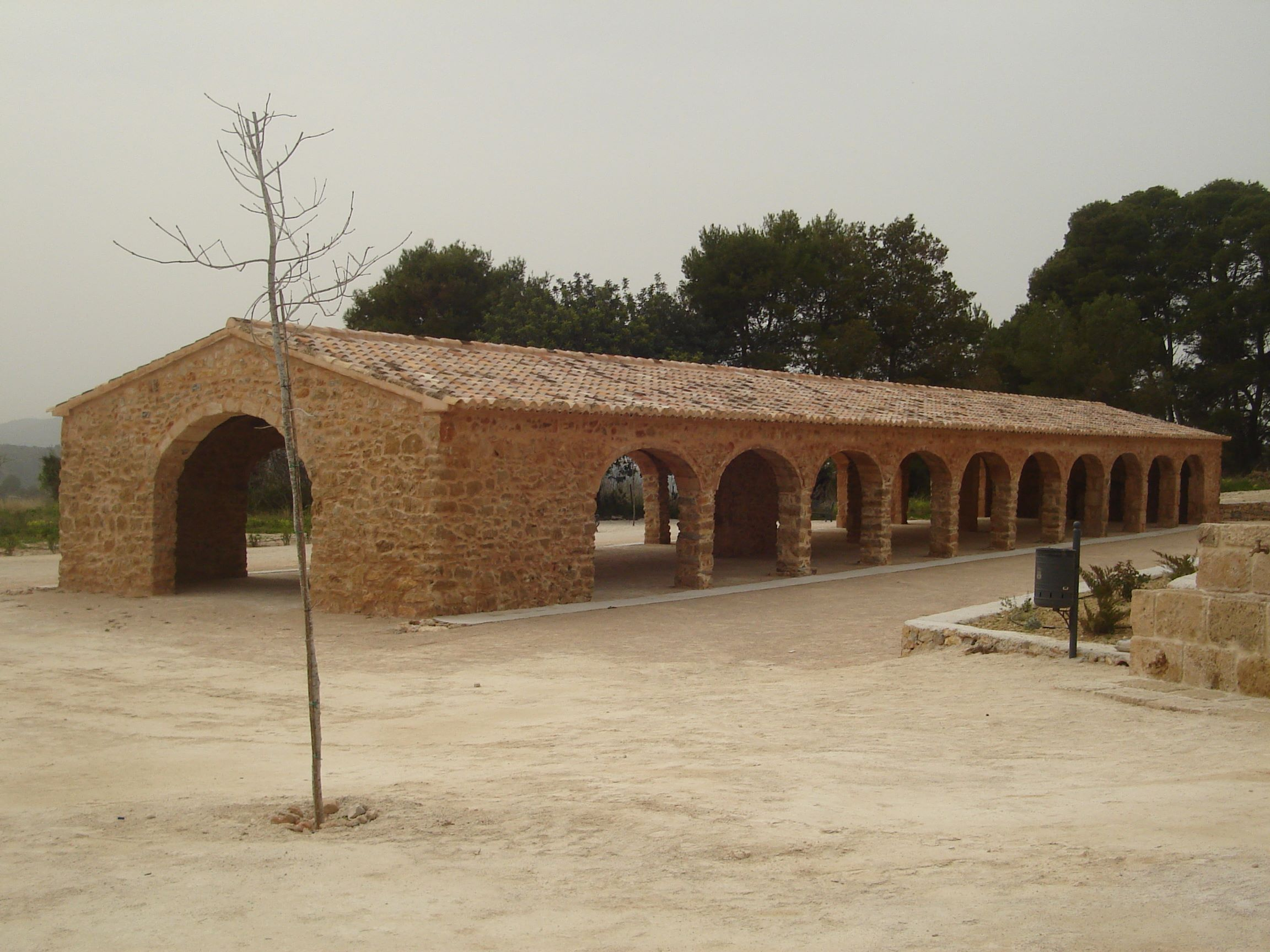 El Gran Riurau del Senyor de Benissadeví recentment restaurat